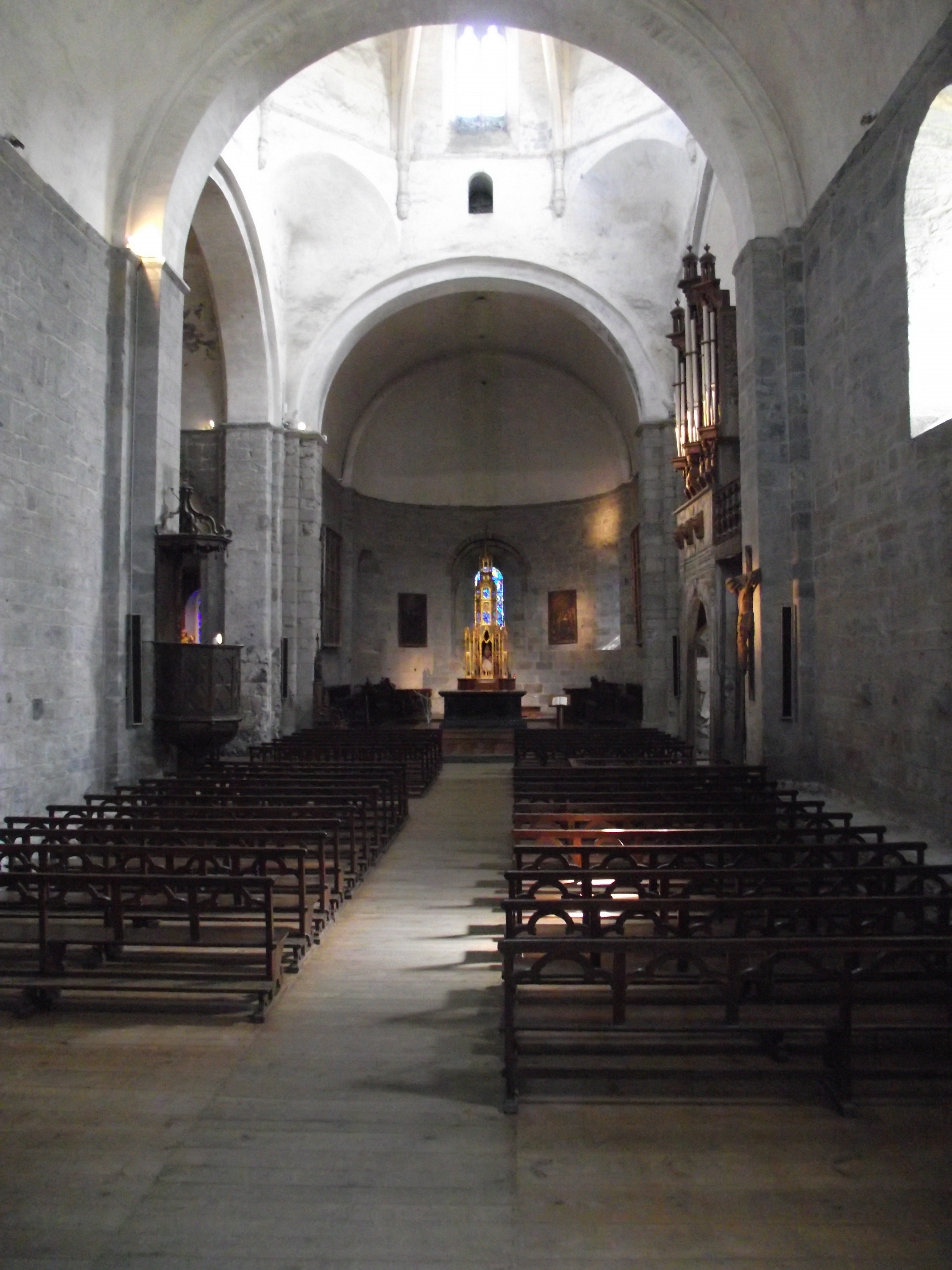 Nef de l'abbatiale de Saint-Savin (Saint-Savin, Hautes-Pyrénées, France)